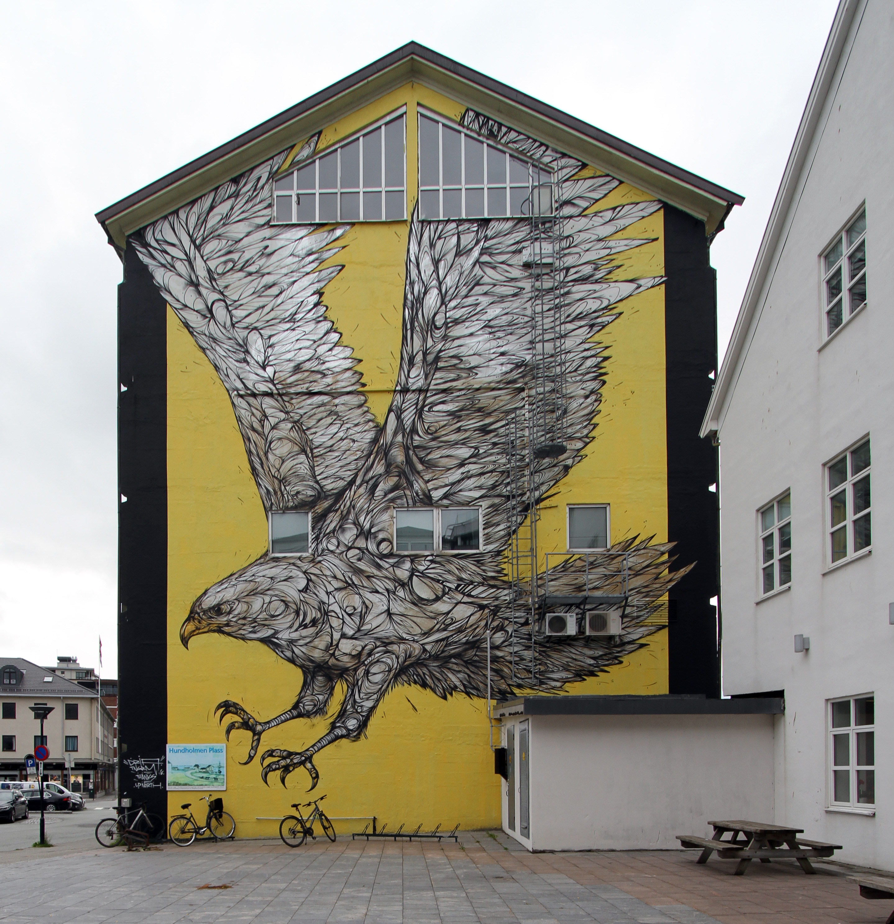 Seeadler-Grafitto in Bodø